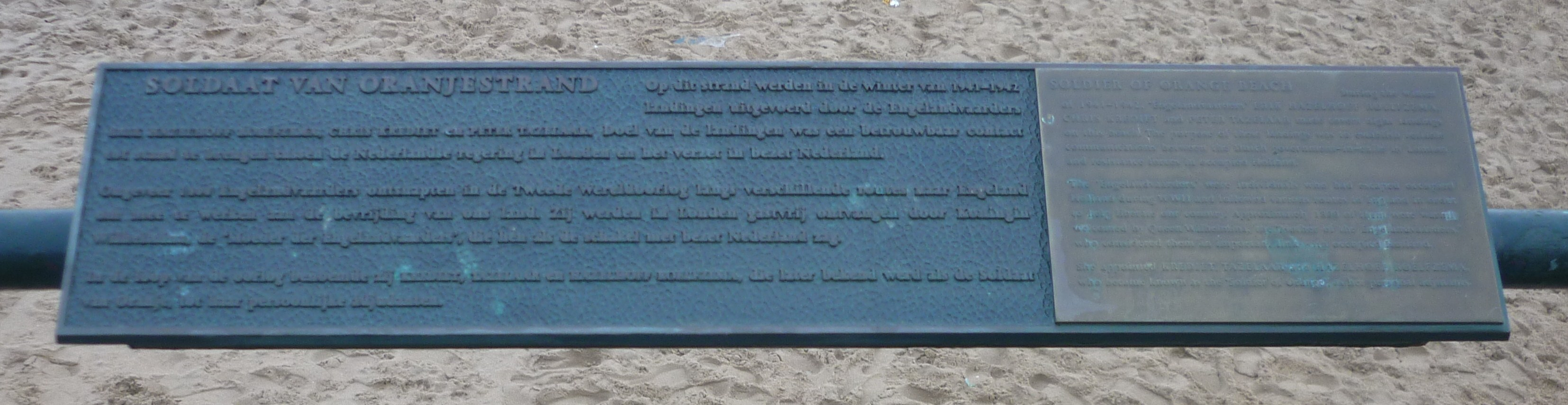 Monument in Scheveningen about Erik Hazelhoff Reelfzema